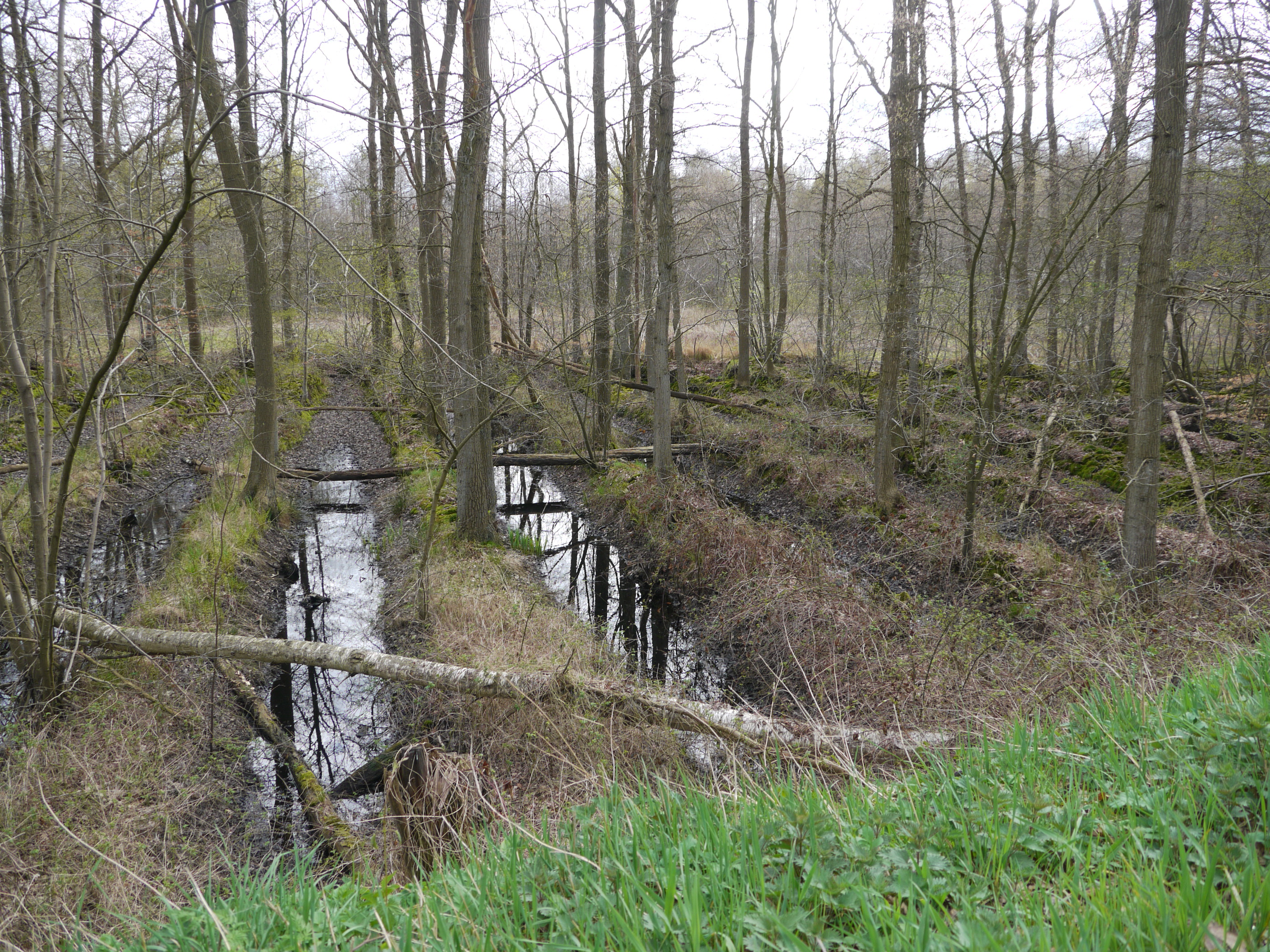 Rabattenbos langs de N345 bij Gietelo (gem. Voorst)